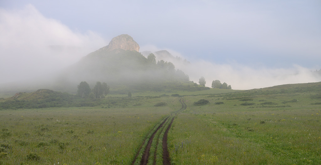 Гора Шляпная в буферной зоне Тигирекского заповедника у деревни Тигирек.